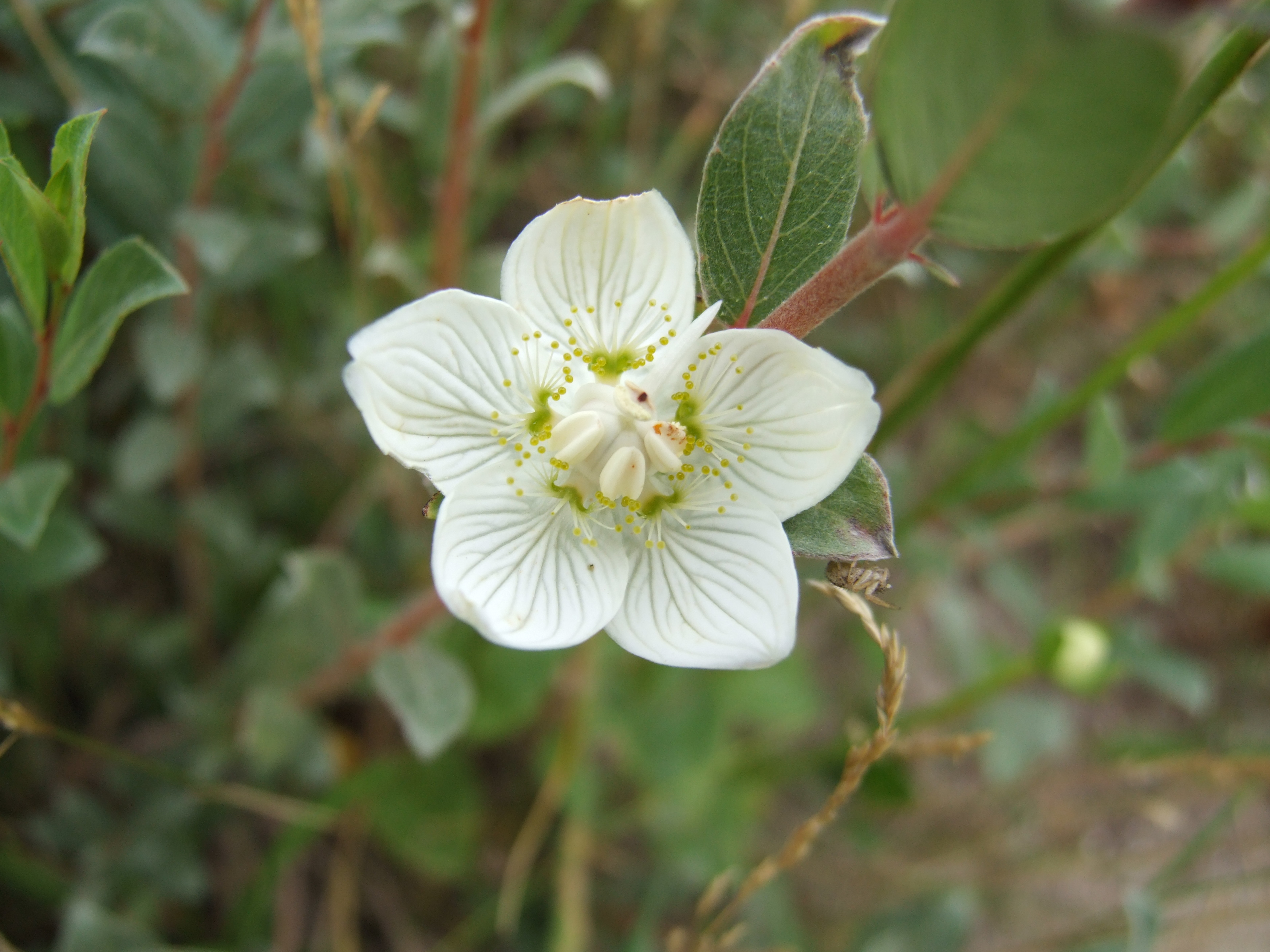 Parnassia palustris - Sumpf-Herzblatt - La Parnassie - Grass of Parnasis - Ort: Dune du Perroquet, Bray-Dunes, Frankreich - Blüte